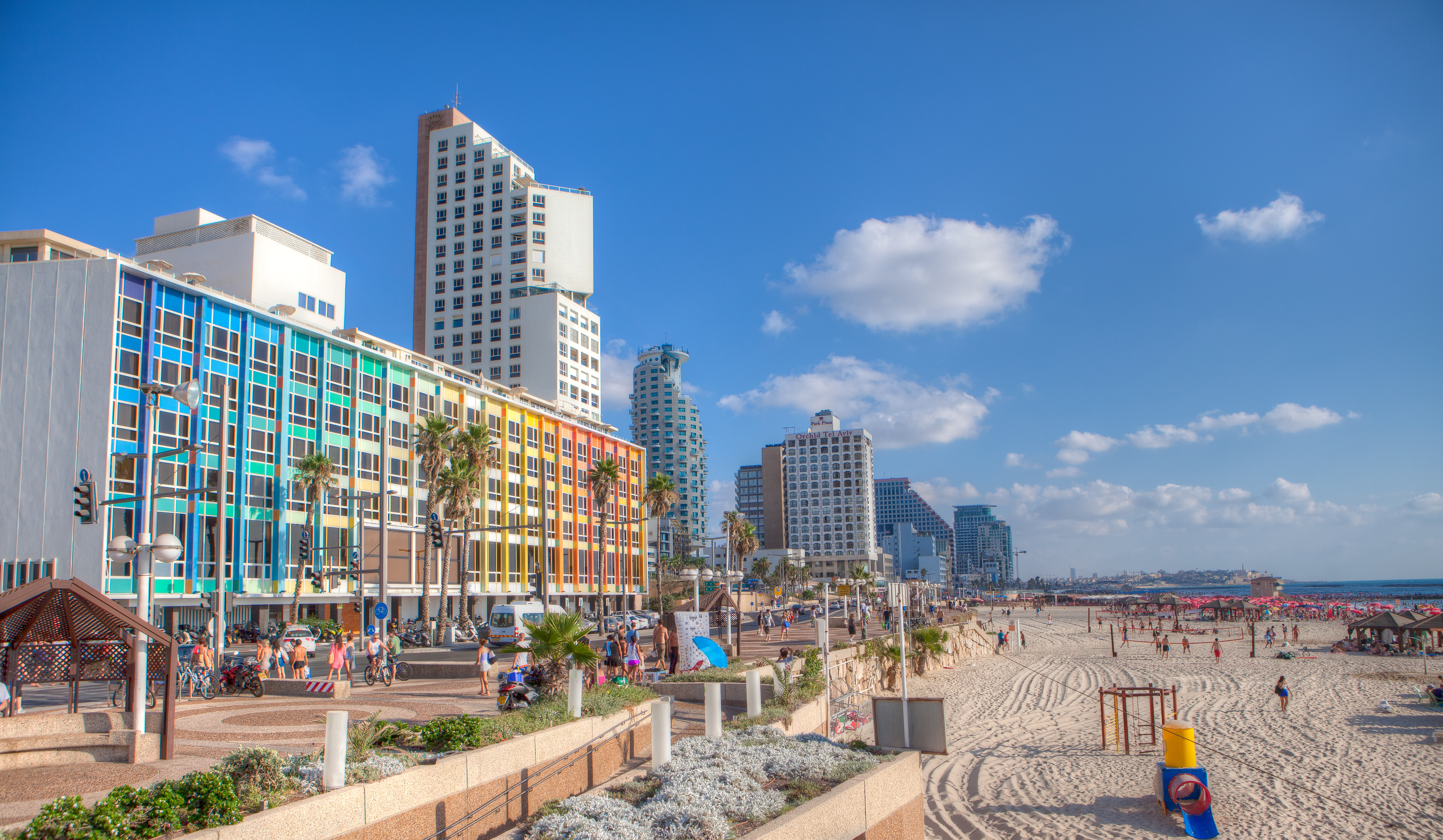 Tel Aviv Promenade panoramics